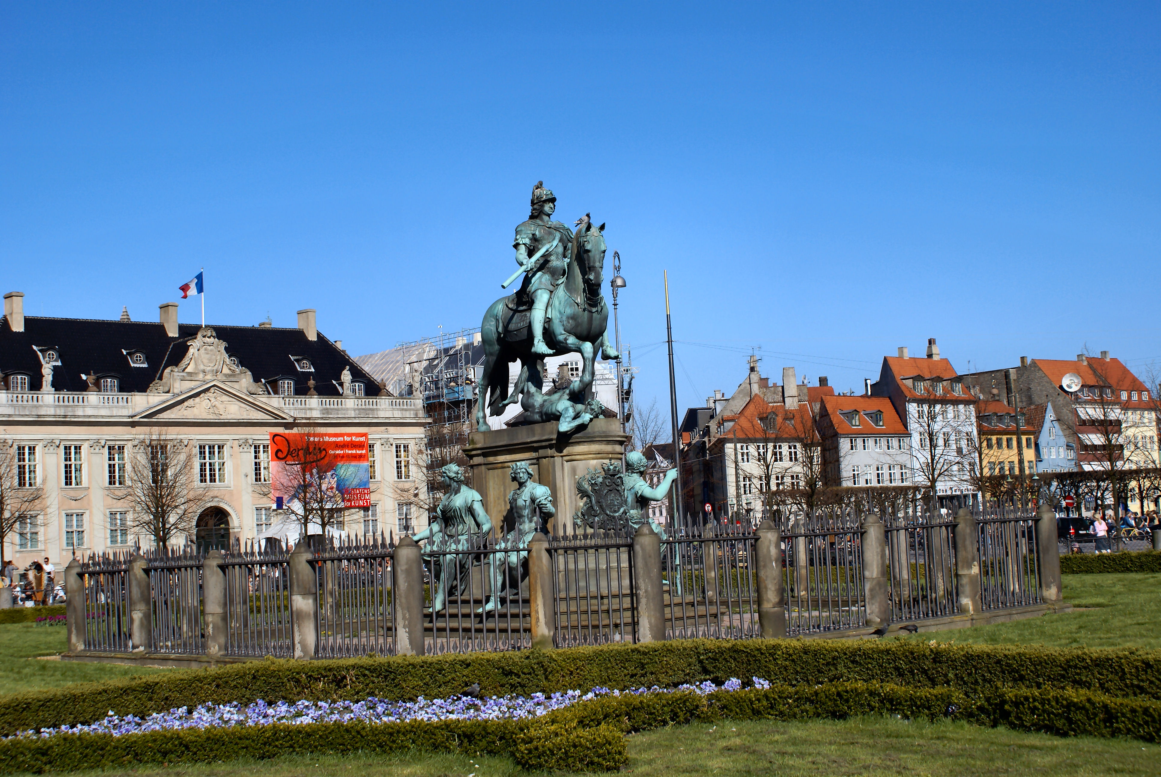 Christian V, statue på Kongens Nytorv